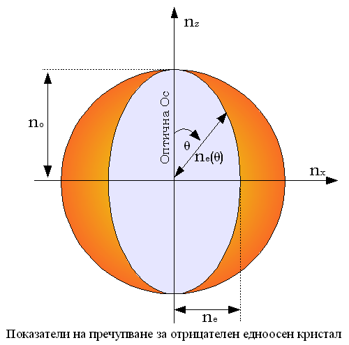 Показатели на пречупване в кристала